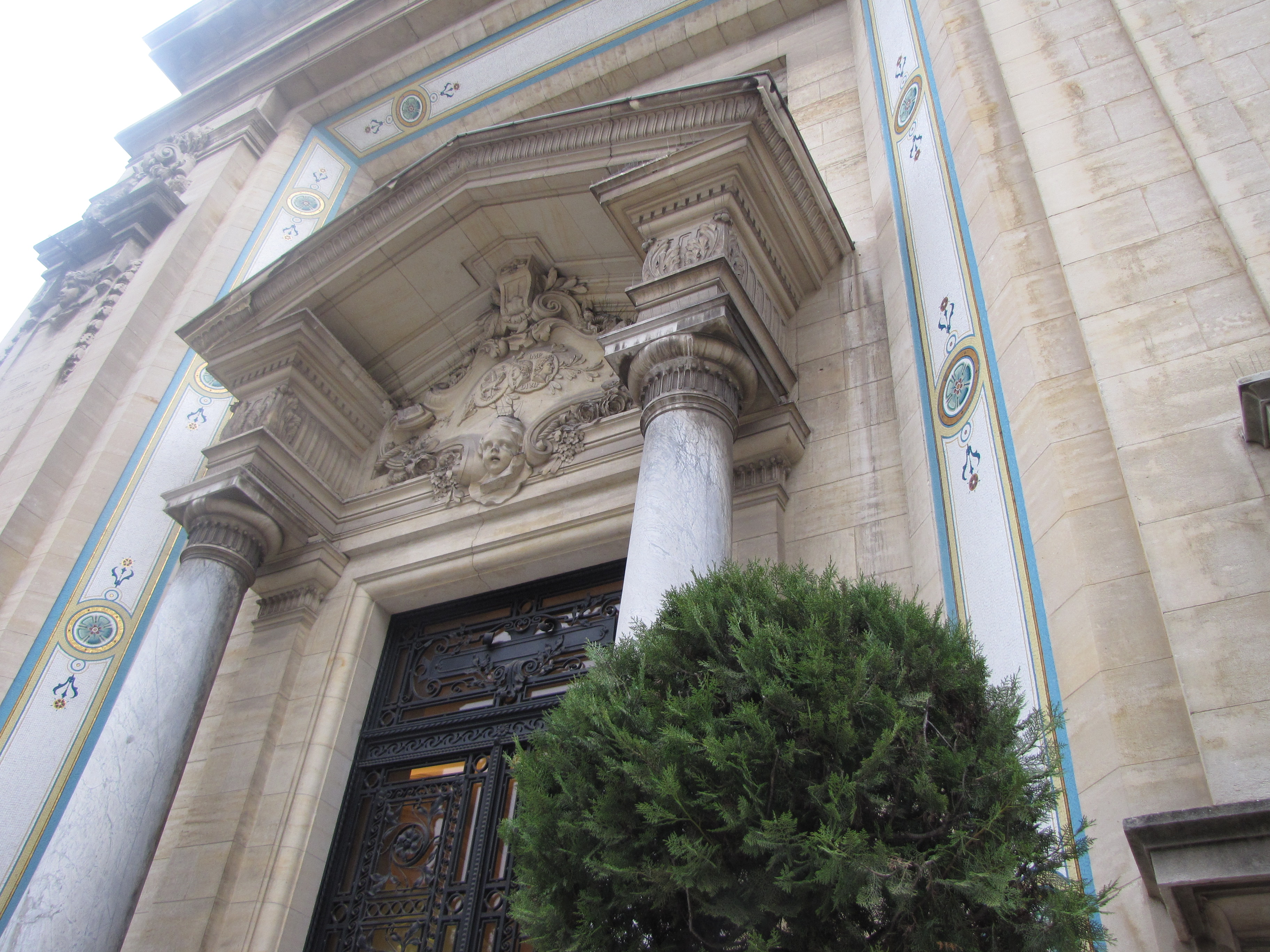 Musée des Beaux-Arts de Nîmes